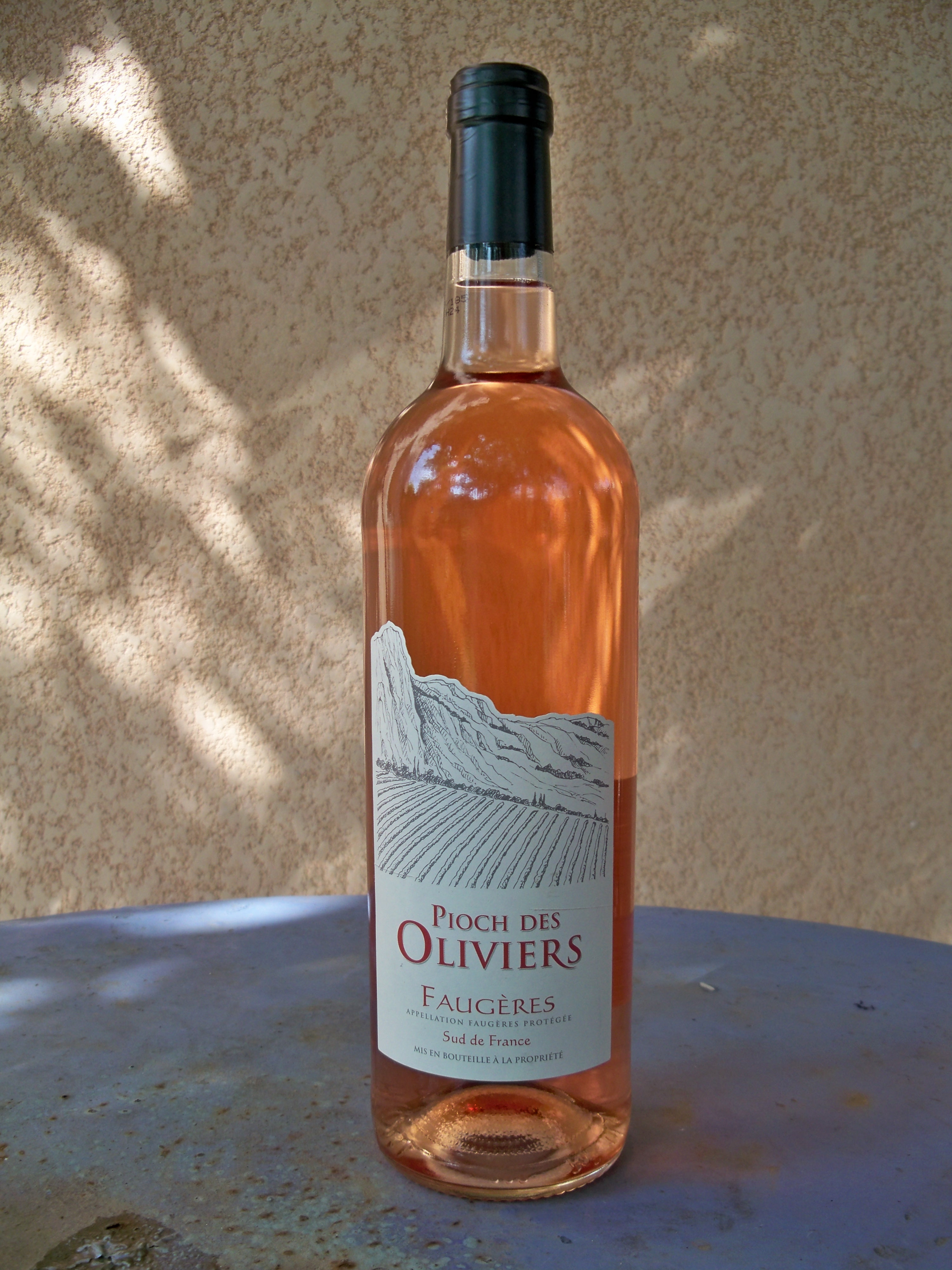 bouteilles de rosé de Pioch des oliviers - Faugères